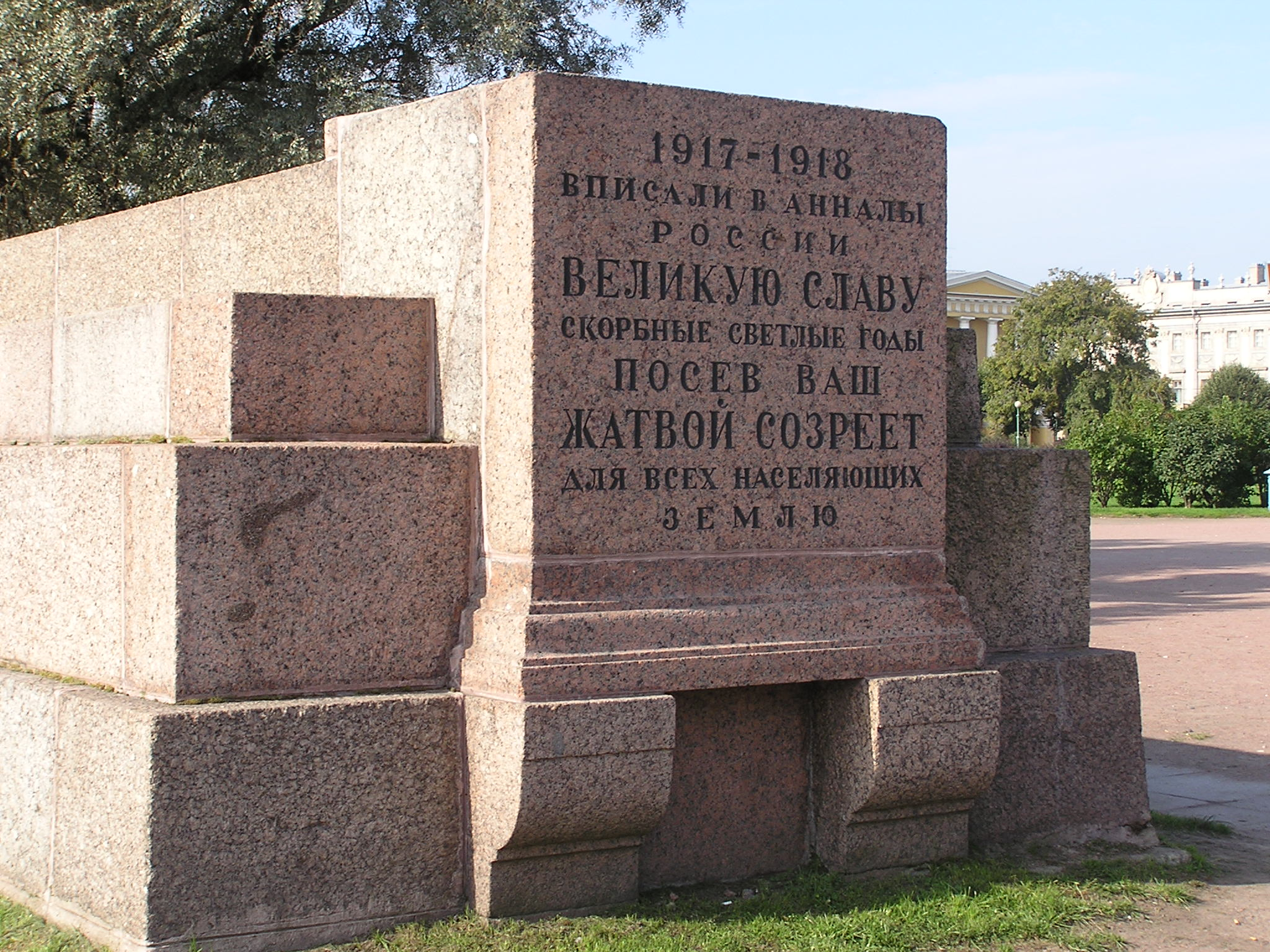 Санкт-Петербург. Марсово поле